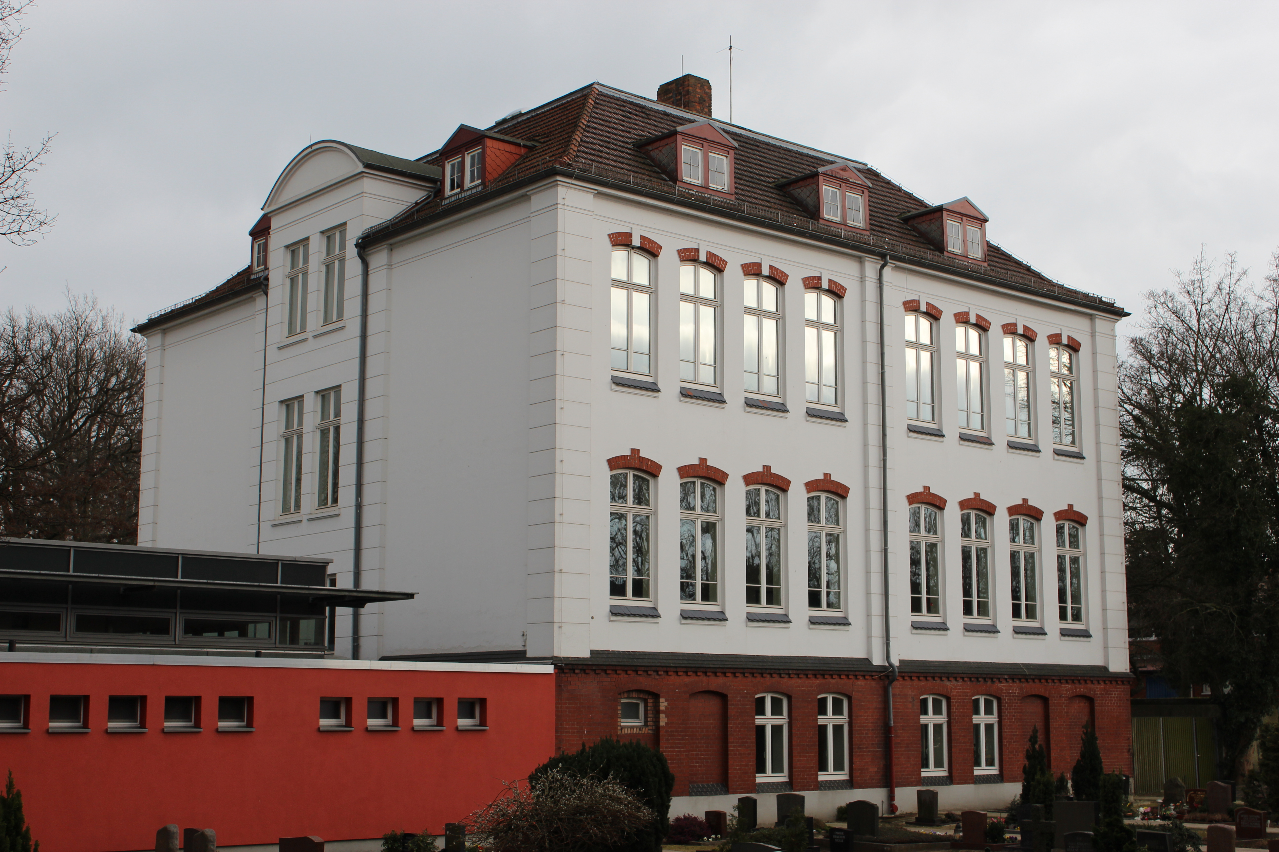 Schule an der Oslebshauser Heerstraße in Bremen, Oslebshauser Heerstraße 115. Das abgebildete Objekt ist ein geschütztes Kulturdenkmal in der Freien Hansestadt Bremen, mit der Nr. 0961 beim Landesamt für Denkmalpflege registriert.